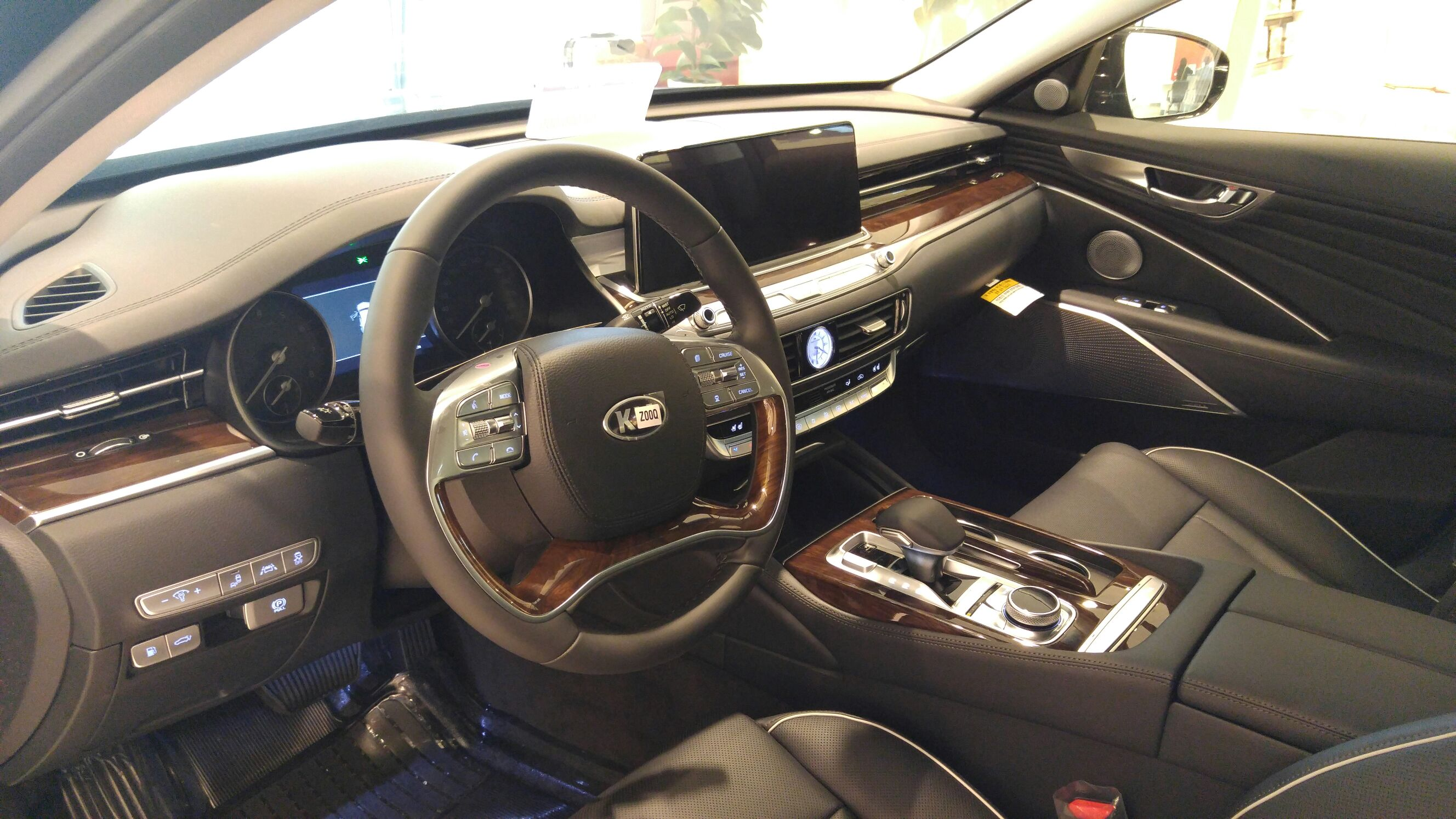 キア・K9